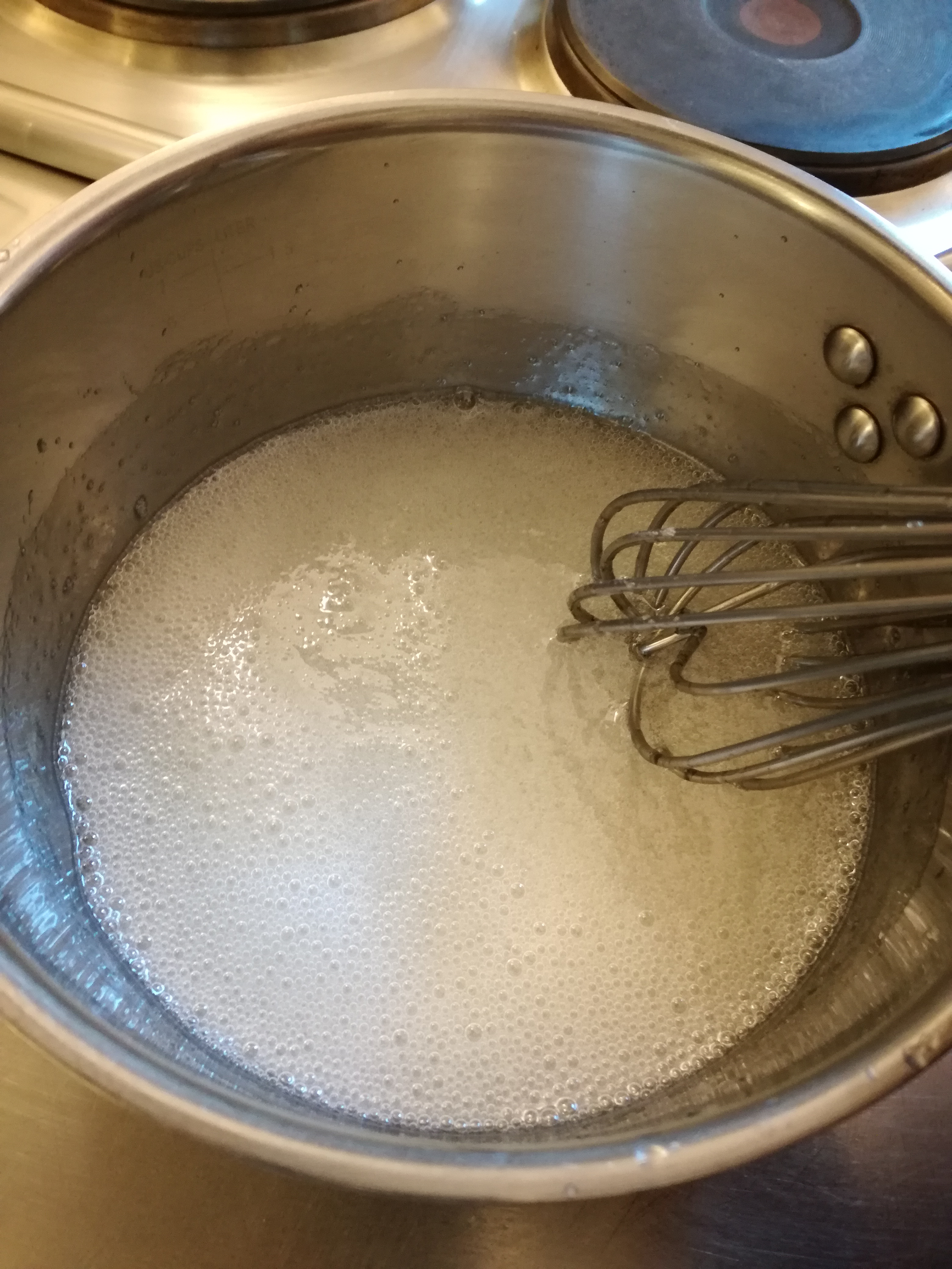 reaccio neutrlaitzacio despren co2